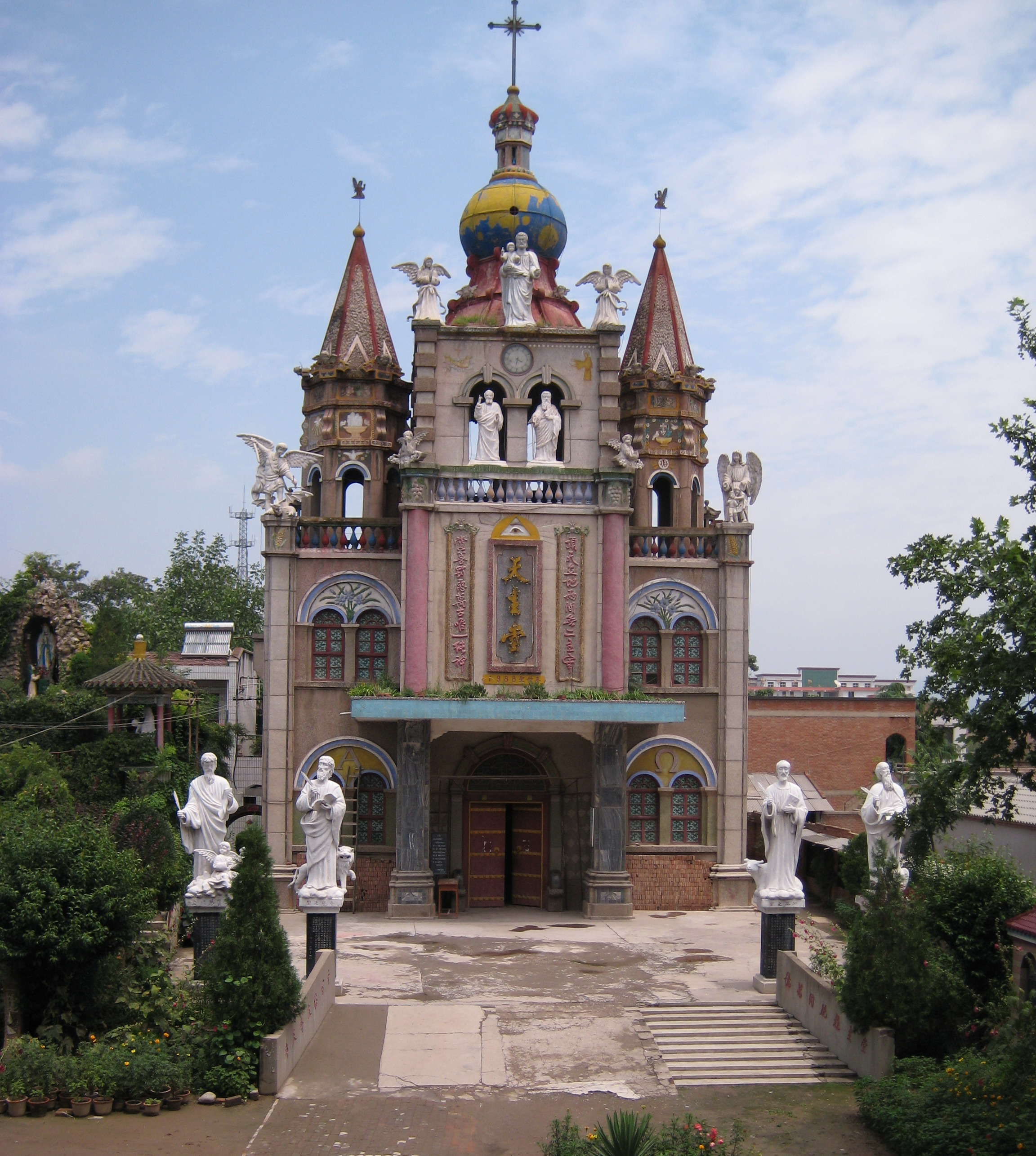 2008年7月17日摄于凤翔教区